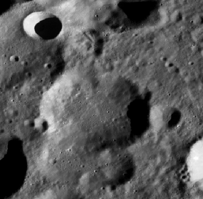 Cráter lunar Ehrlich. (Imagen LRO)